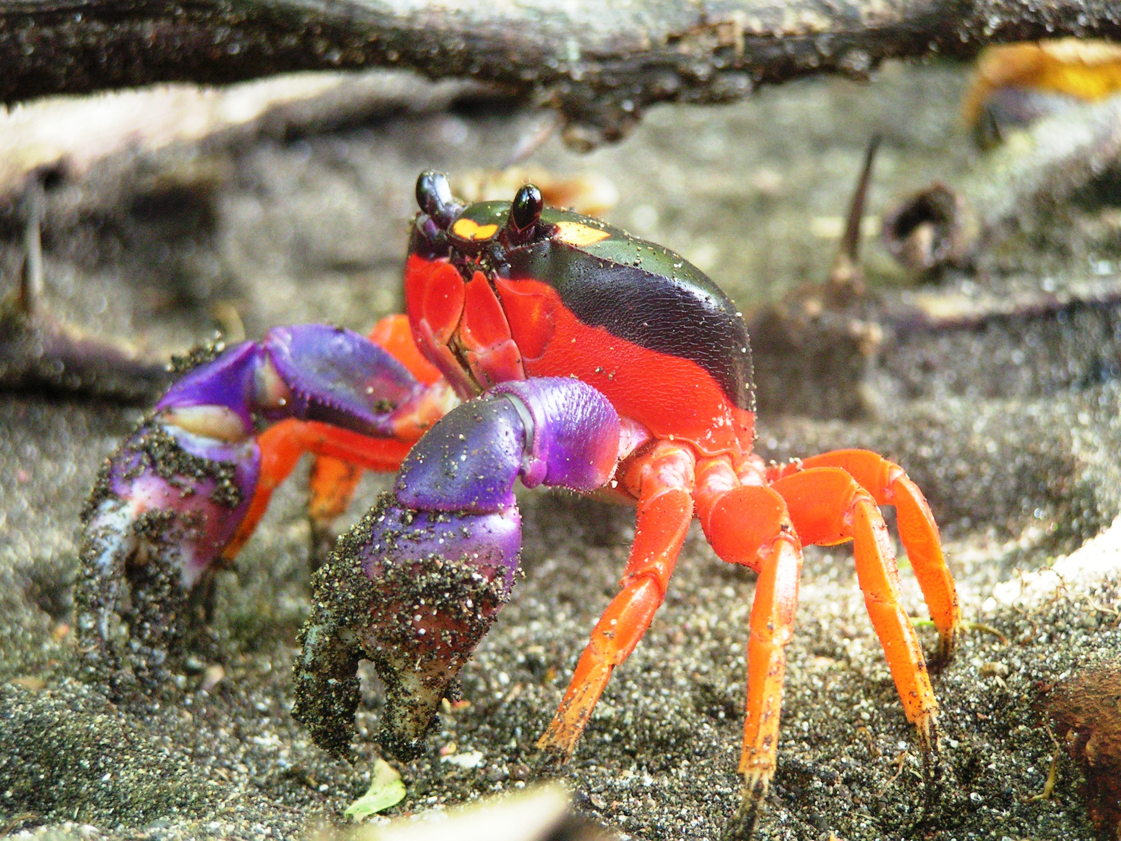 foto tomada en playa la marinera en la republica de Panamá